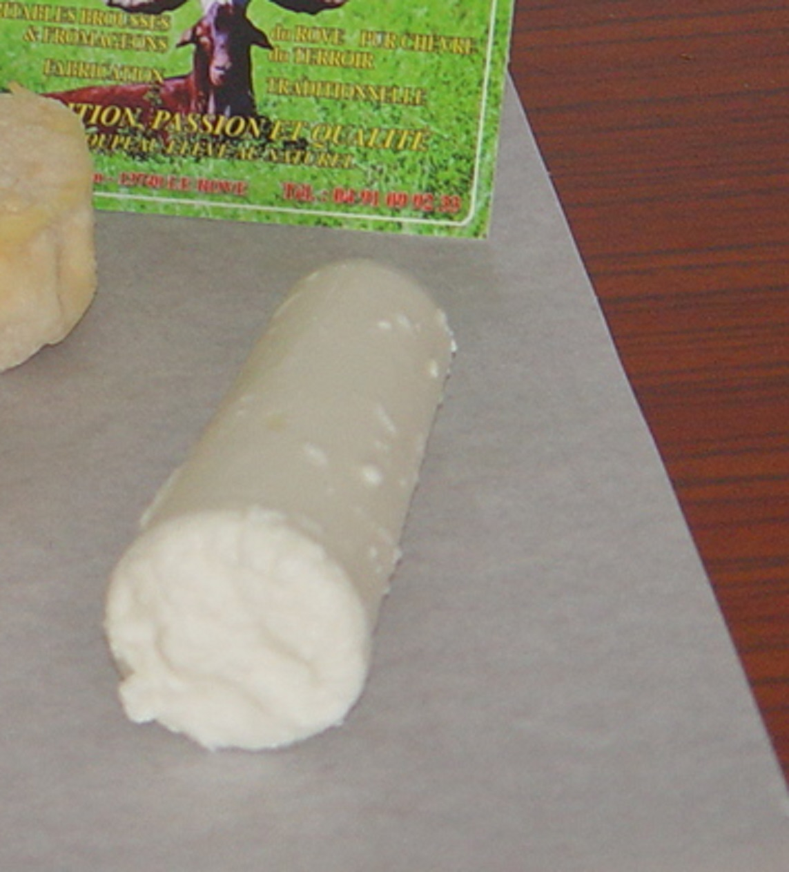 Brousse du Rove